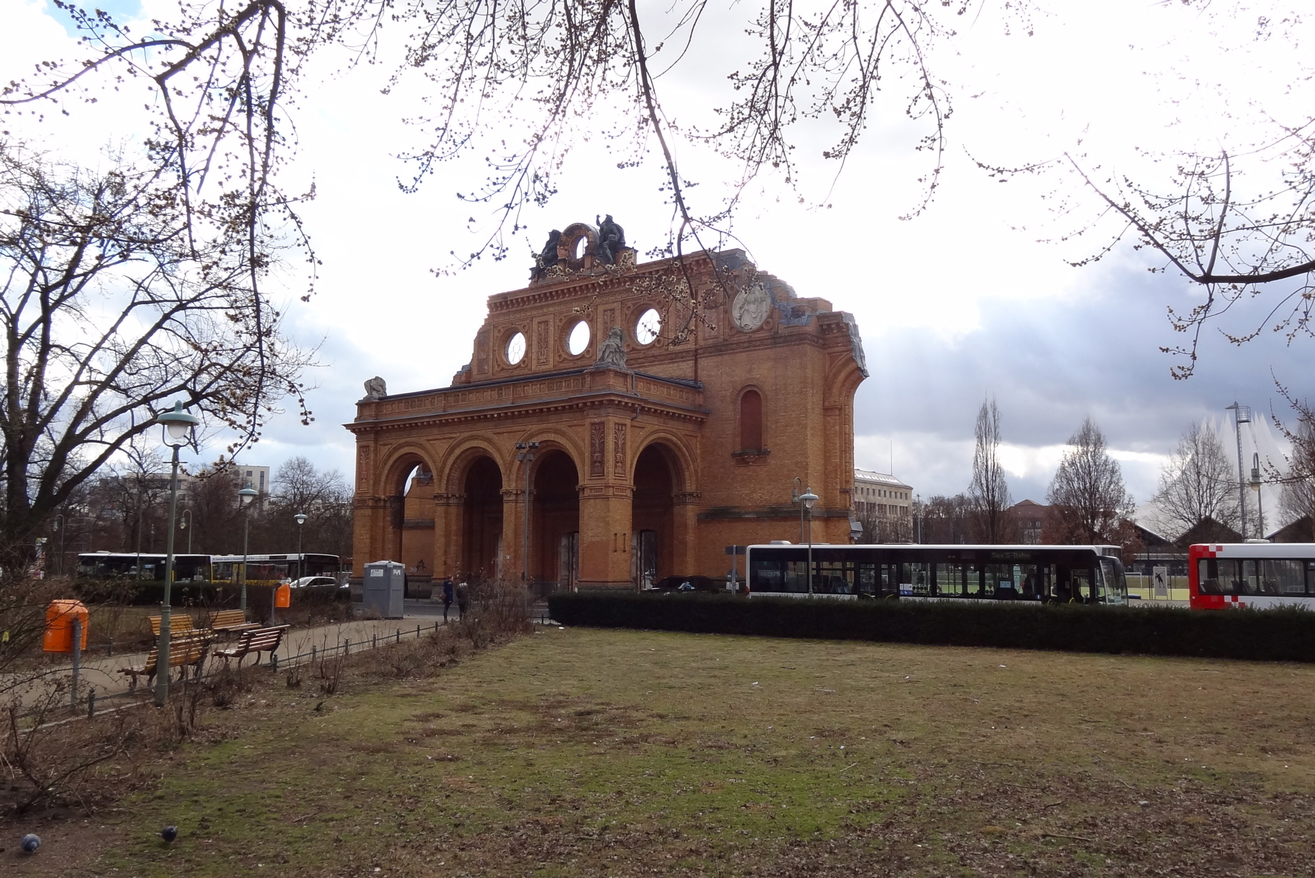 Portal des ehemaligen Anhalter Bahnhofs in Berlin (Hauptgebäude gesprengt 1959) .